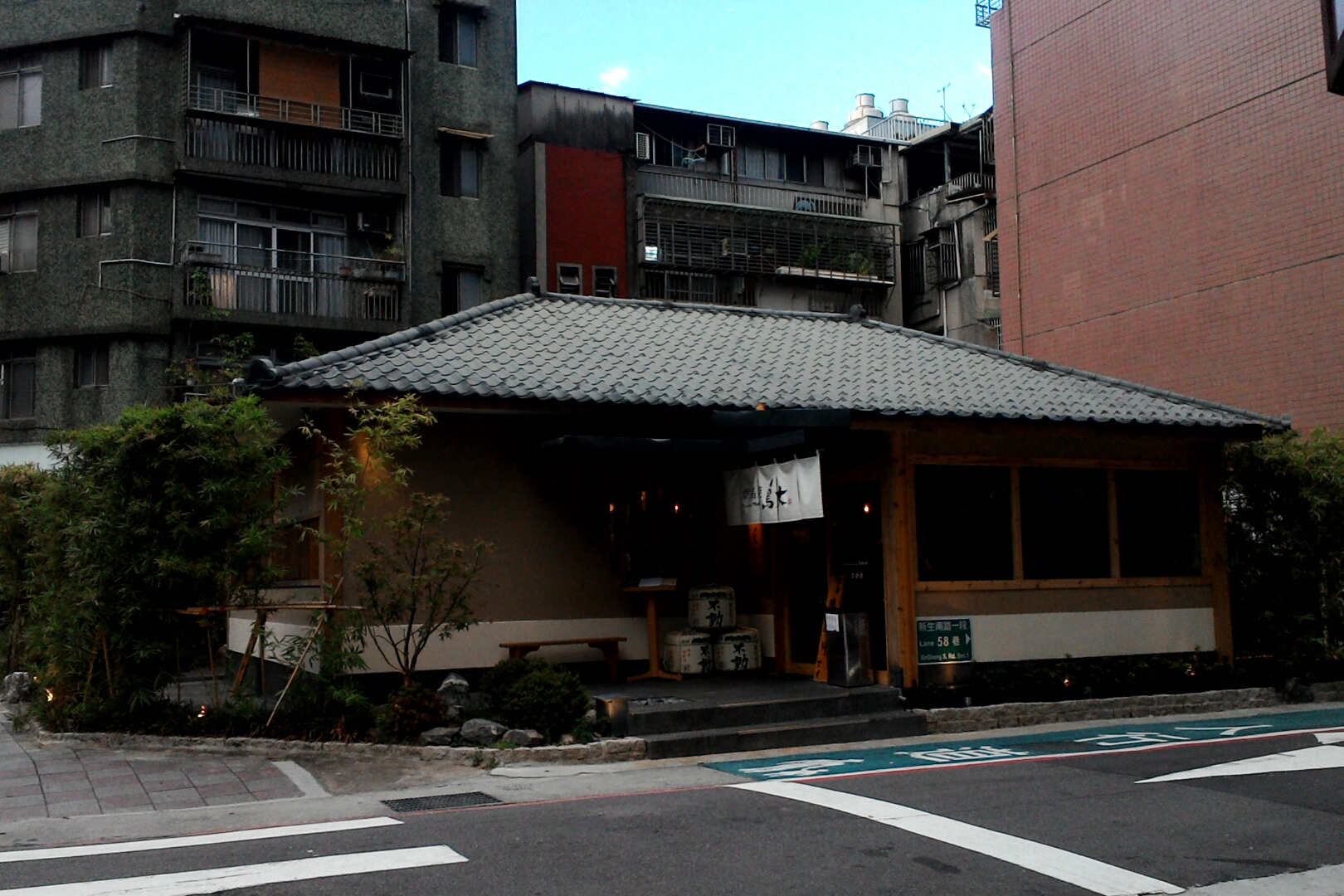 忠孝東路二段134巷18號日式宿舍,台北市中正區東門次分區幸市里